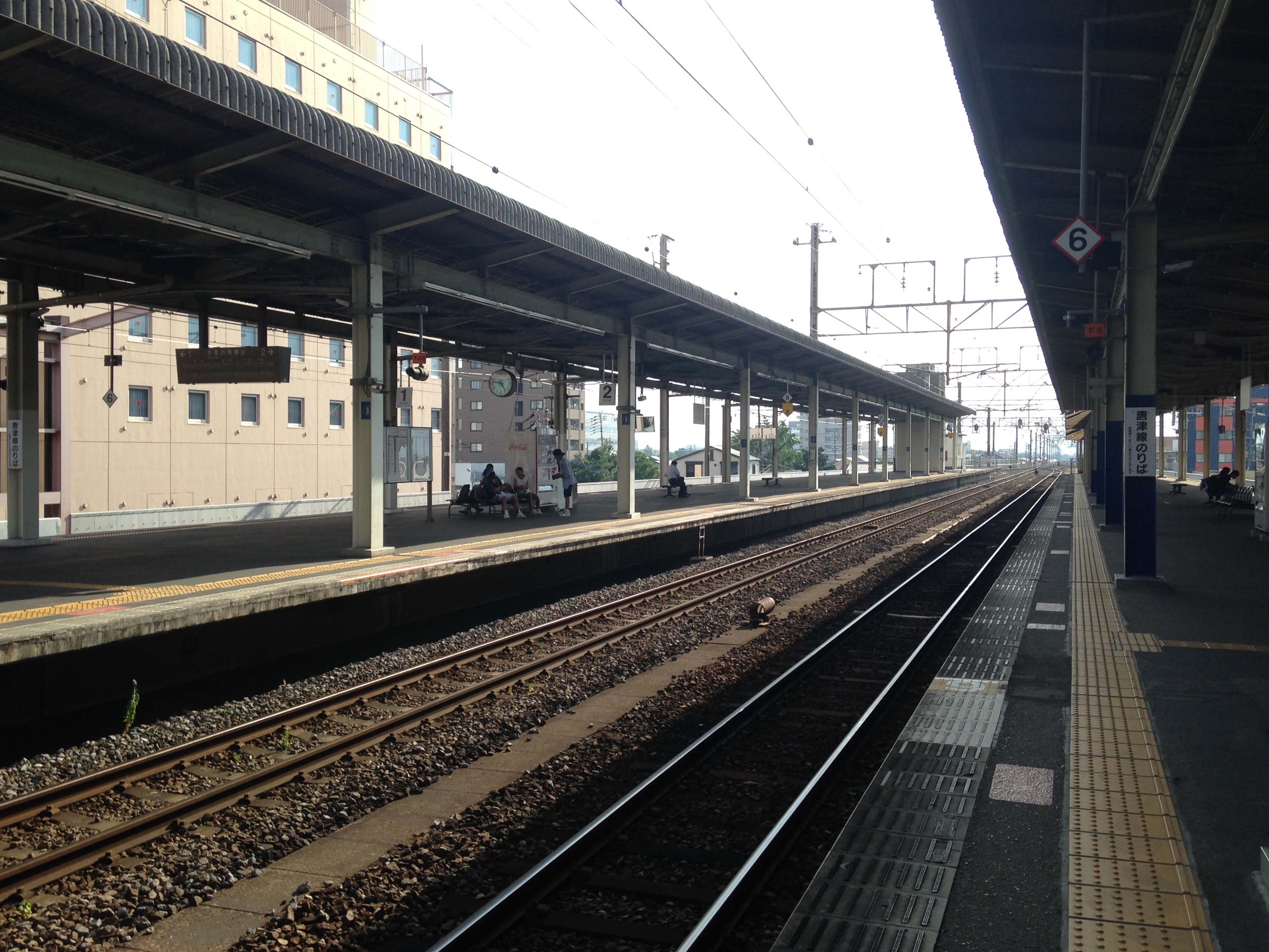 佐賀駅のホーム(鍋島方面)